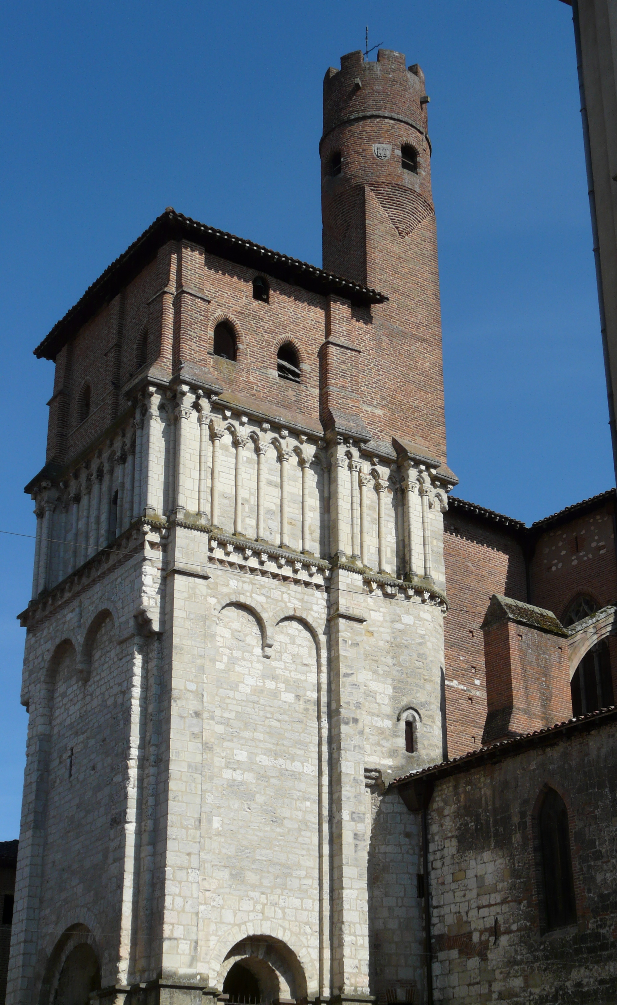 Tour ronde dite de la Gacholle. .